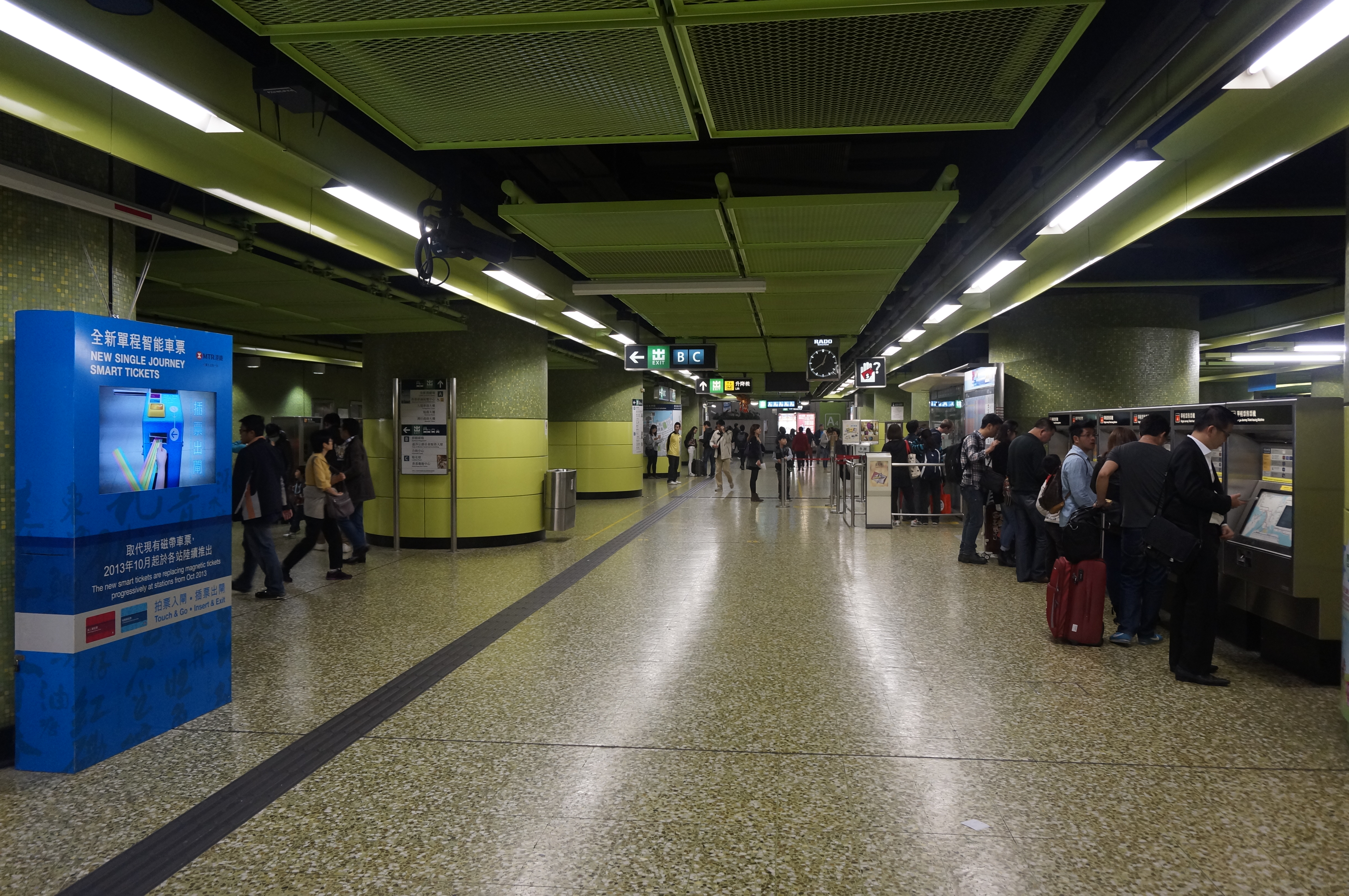 港鐵灣仔站大堂